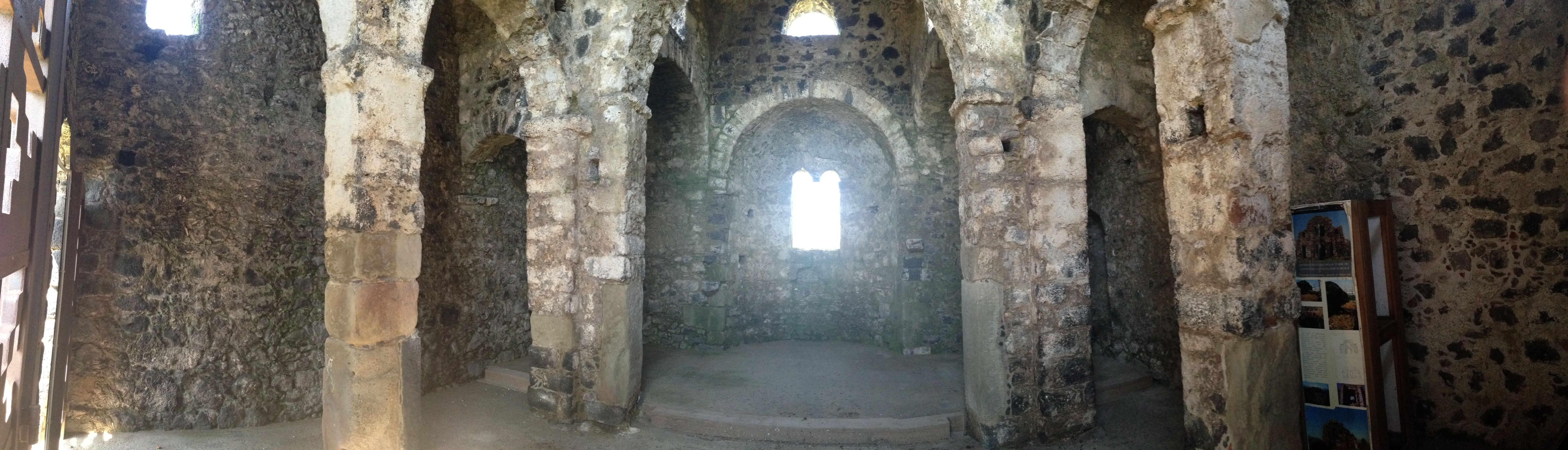 Cuba di Santa Domenica - interno